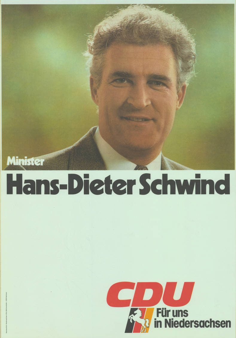 Minister Hans-Dieter Schwind CDU Für uns in Niedersachsen Abbildung: Porträtfoto - Nationalfarben mit Niedersachsenross Plakatart: Kandidaten-/Personenplakat mit Porträt Auftraggeber: Verantw.: Niedersachsen-CDU, Hannover Objekt-Signatur: 10-008 : 413 Bestand: Landtagswahlplakate Niedersachsen (10-008) GliederungBestand10-18: Landtagswahlplakate Niedersachsen (10-008) » CDU Lizenz: KAS/ACDP 10-008 : 413 CC-BY-SA 3.0 DE